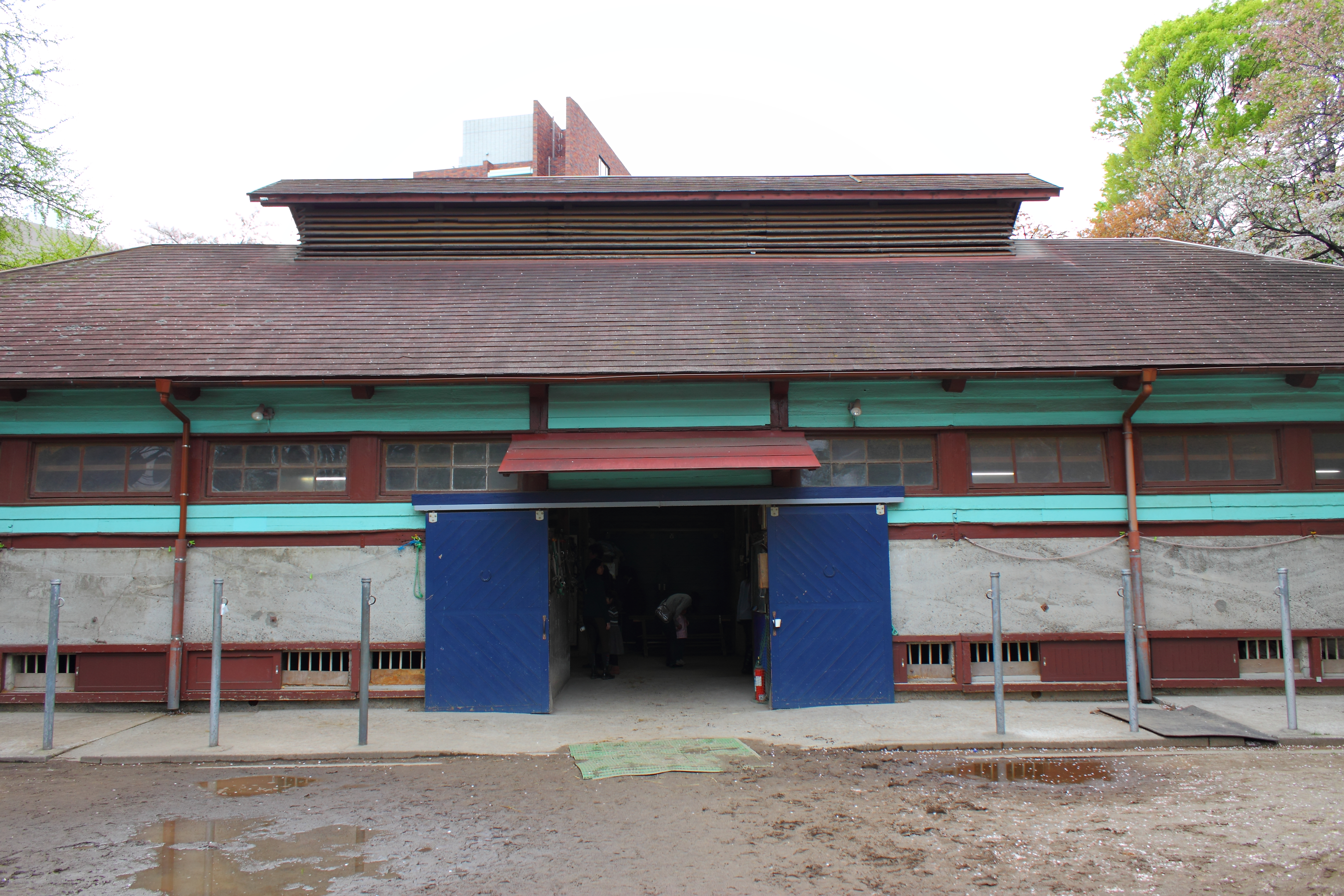 学習院大学、厩舎（国登録有形文化財）